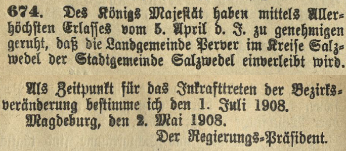 Eingemeindung der Landgemeinde Perver in den Stadtbezirk Salzwedel am 1. Juli 1908